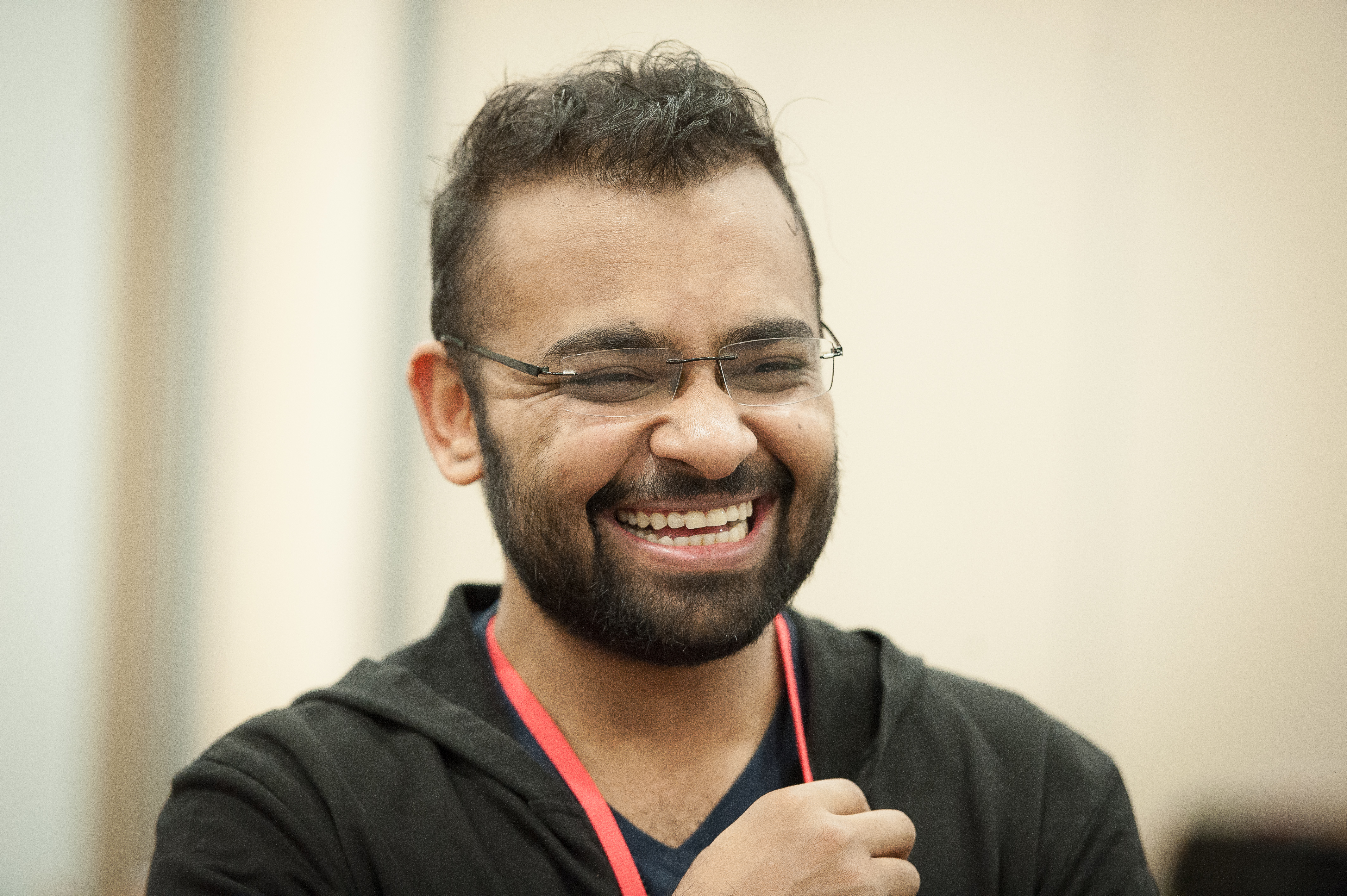 GM Abhijeet Gupta